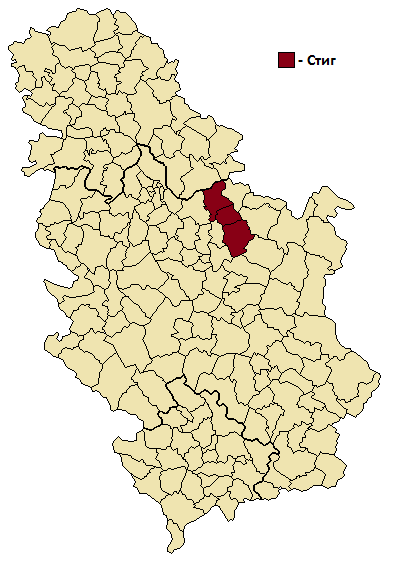 Положај равнице Стиг на карти Србије